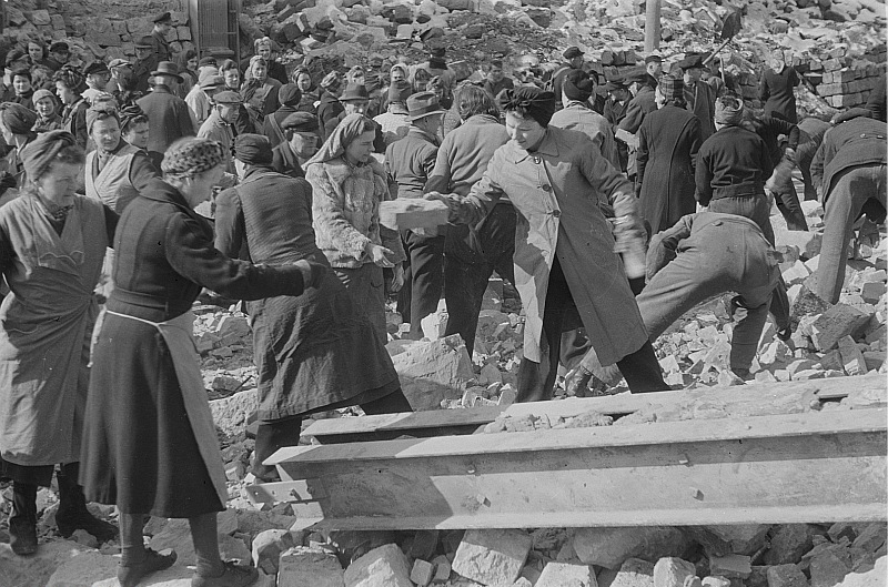 Original image description from the Deutsche Fotothek Dresden. Transport geputzter Ziegel von Hand zu Hand